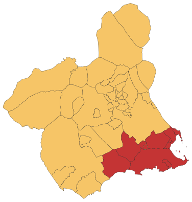 Localización aproximada de la hipotética provincia de Cartagena: municipios de Cartegena, La Unión, Mazarrón, Fuente Álamo, Torre Pacheco, Los Alcázares, San Javier y San Pedro del Pinatar, y pedanía de Lobosillo.